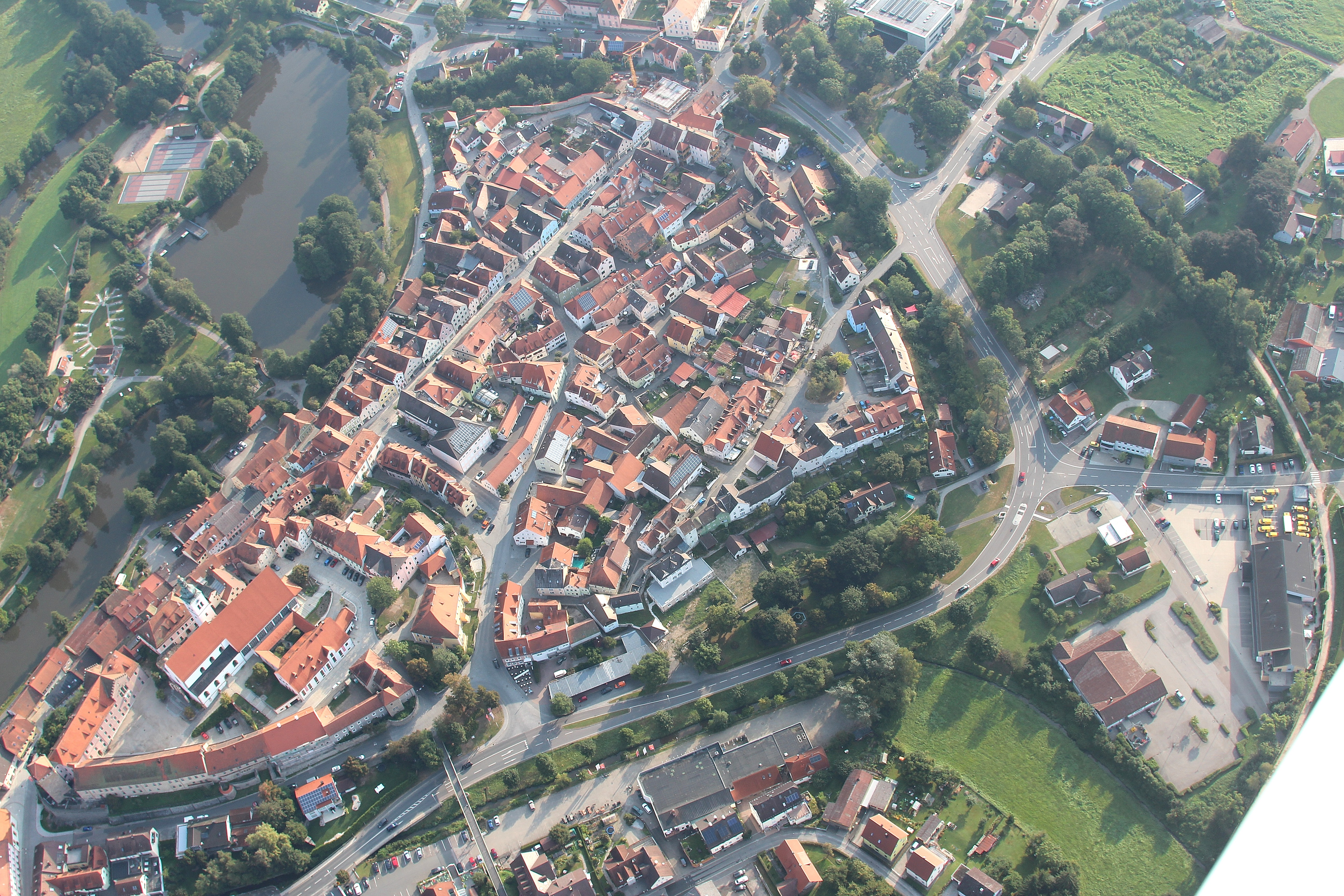 Stadtkern Neunburg vorm Wald, Landkreis Schwandorf, Oberpfalz, Bayern